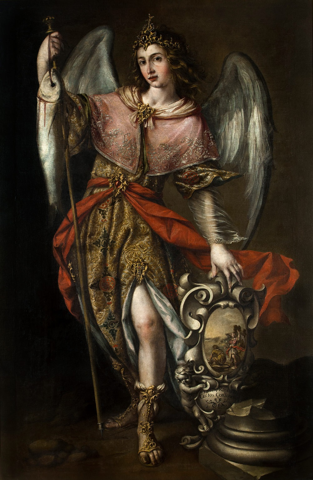 La obra representa al arcángel San Rafael, y forma pareja con otro cuadro que representa al Arcángel San Miguel y que se conserva en el Palacio de Viana de Córdoba, (España), habiendo sido pintados ambos por el célebre pintor sevillano Juan de Valdés Leal.